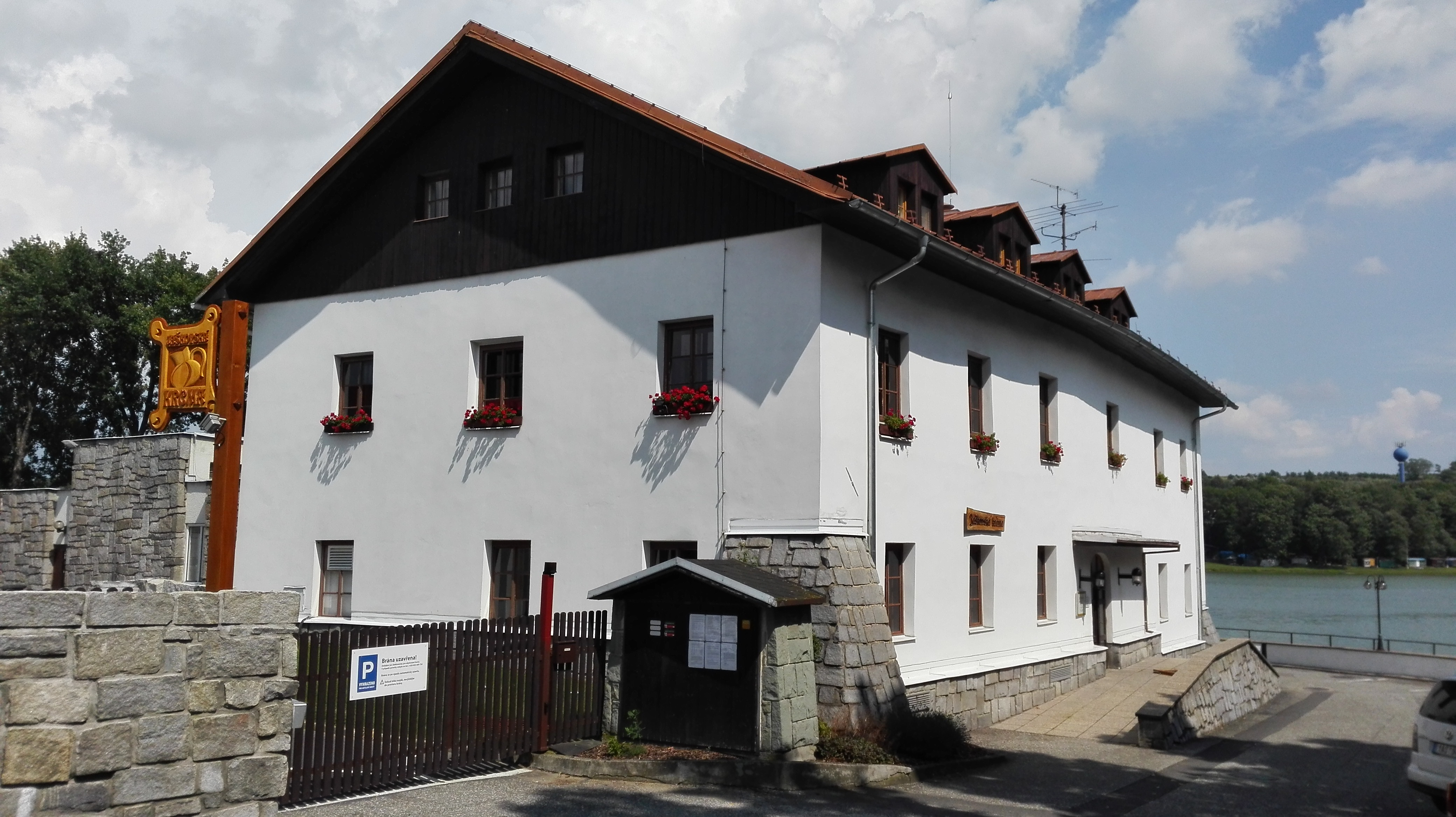 Jaškovská krčma - nejstarší dochovaná budova v obci Těrlicko. První doložená zmínka z roku 1268. V pozadí přehradní nádrž Těrlicko.